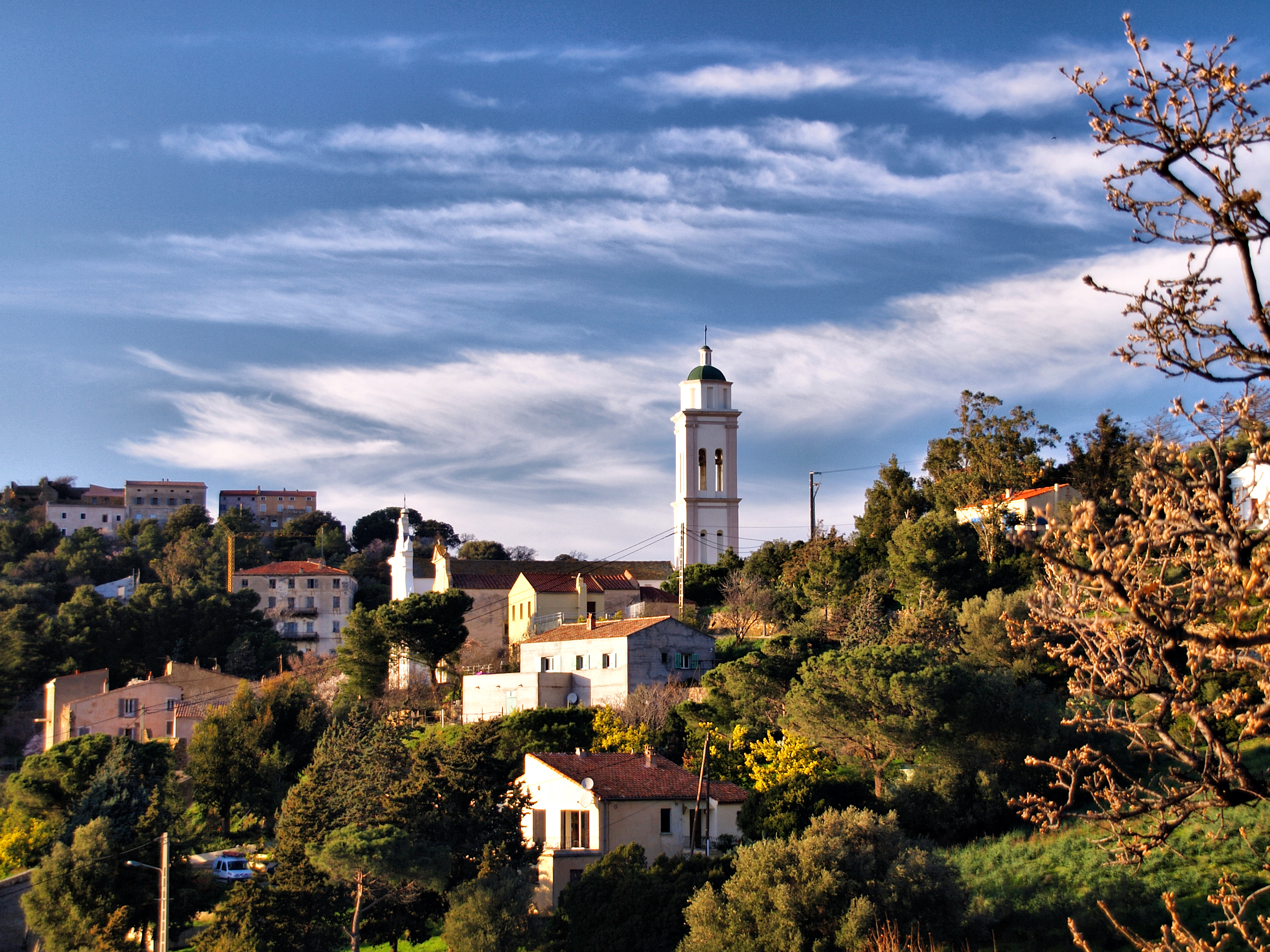 Corbara - "A Nunziata" et quartier Pietralta